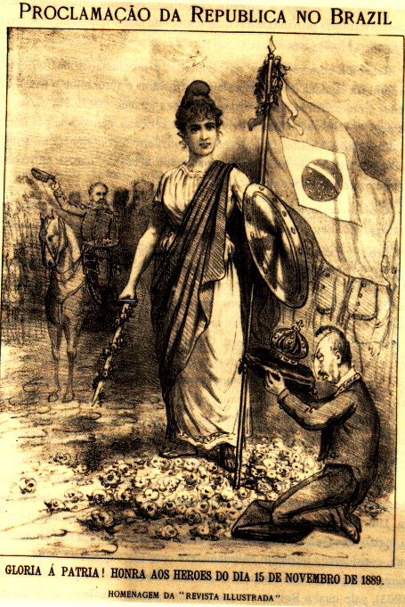 Alegoria da República Brasileira, homenagem da Revista Illustrada